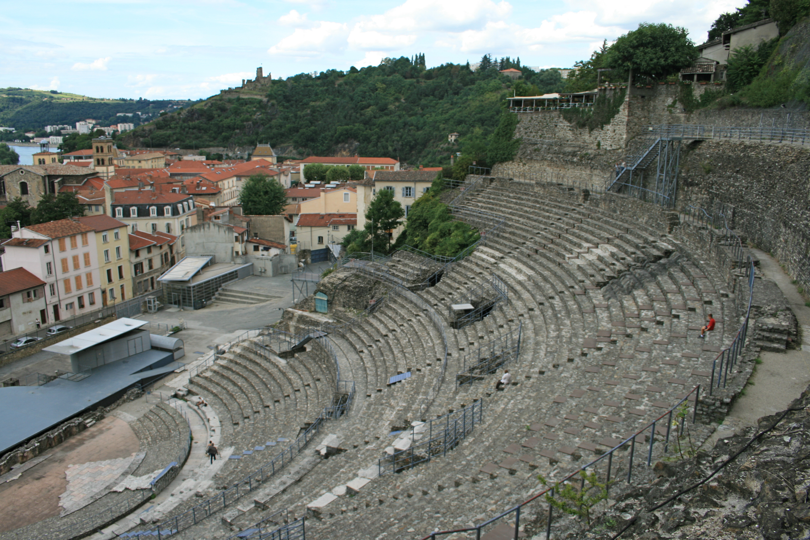 Vue générale de la cavea du Théâtre Antique de Vienne (38) depuis le sud-est.